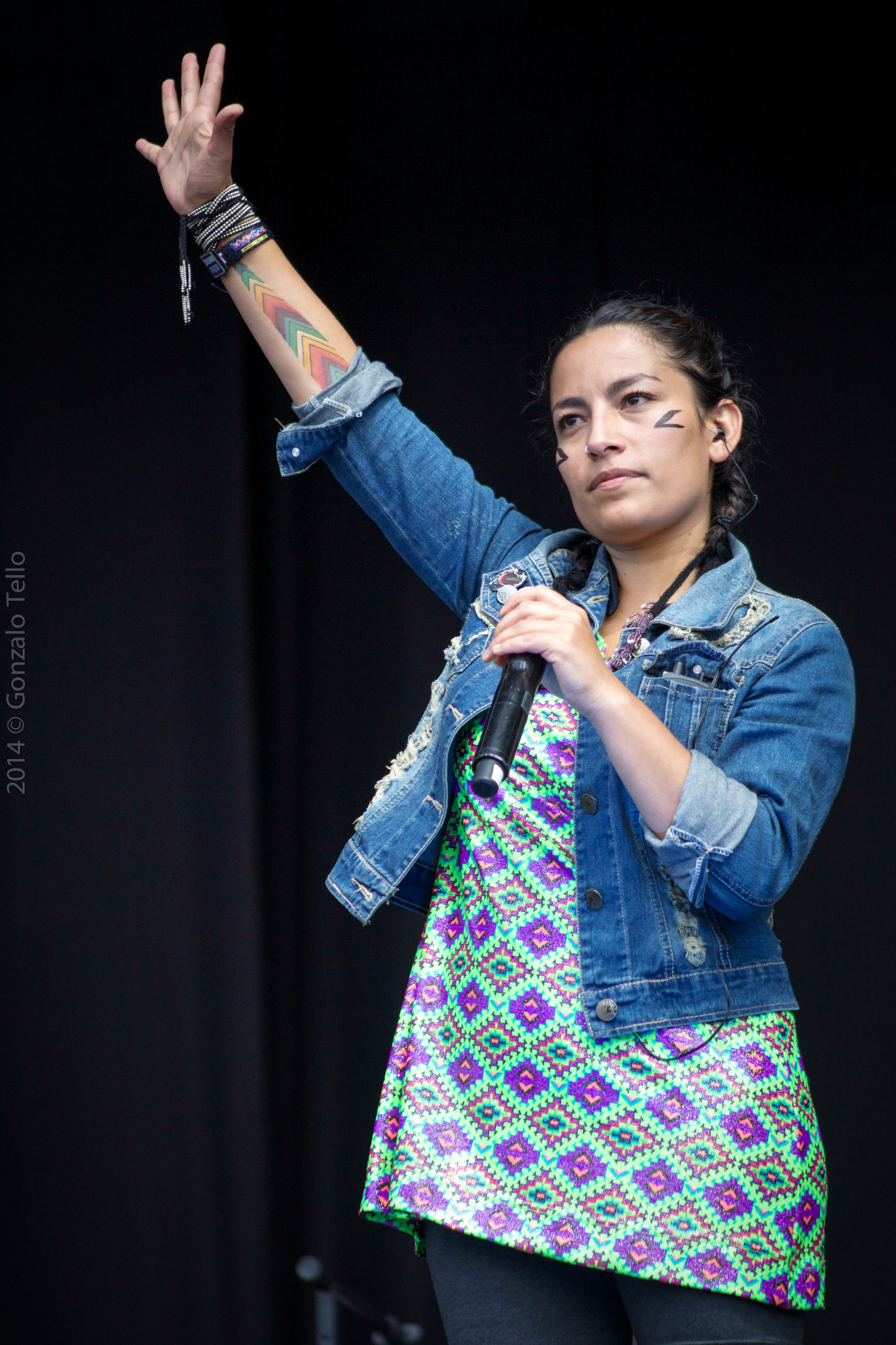 Foto: Gonzalo Tello